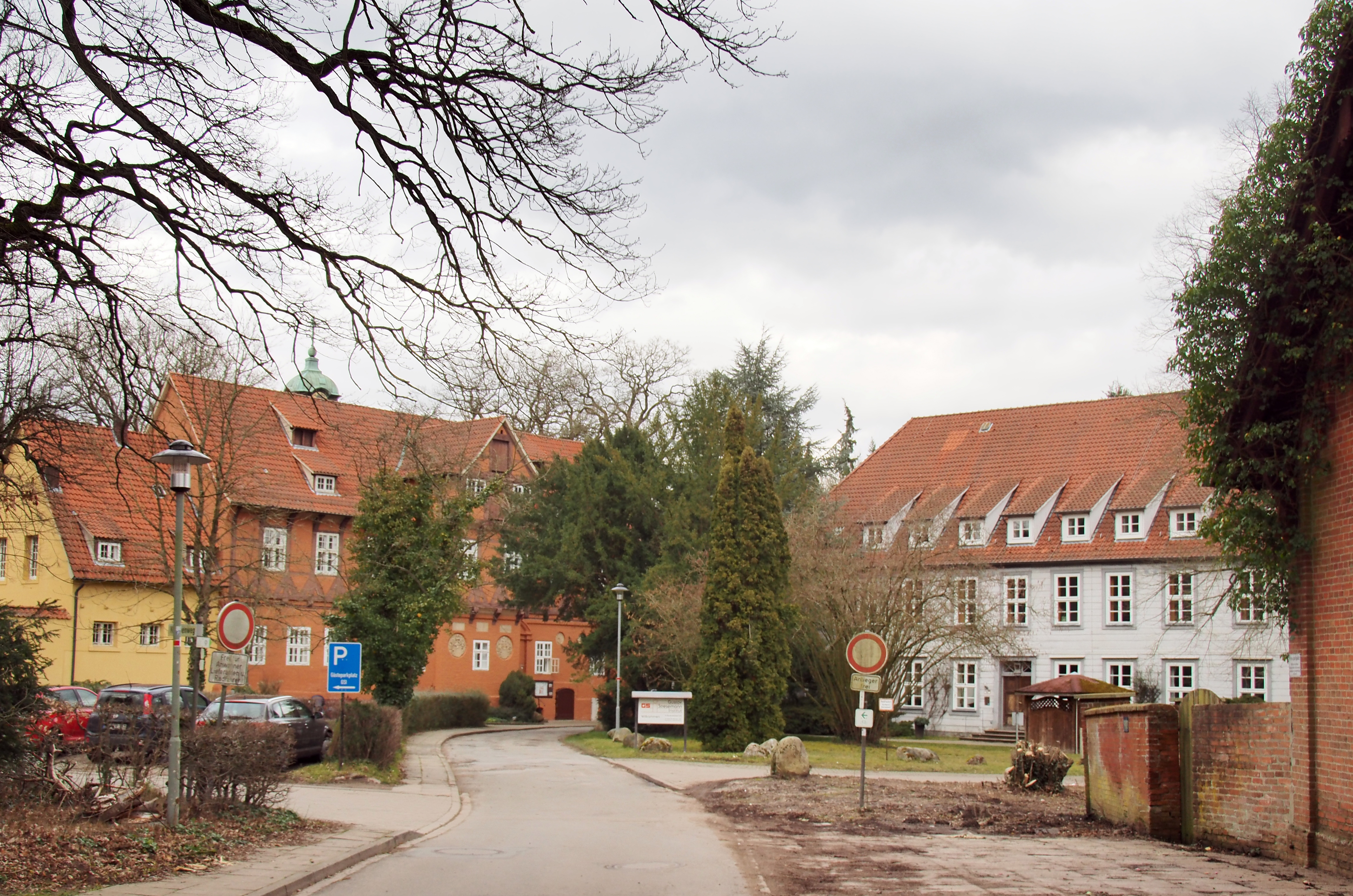 Ehemaligen Amtsgerichtsgebäude von 1541 und ehemaliges Richterwohnhaus, jetzt Teil des Gustav Stresemann Instituts in Medingen (Bad Bevensen)